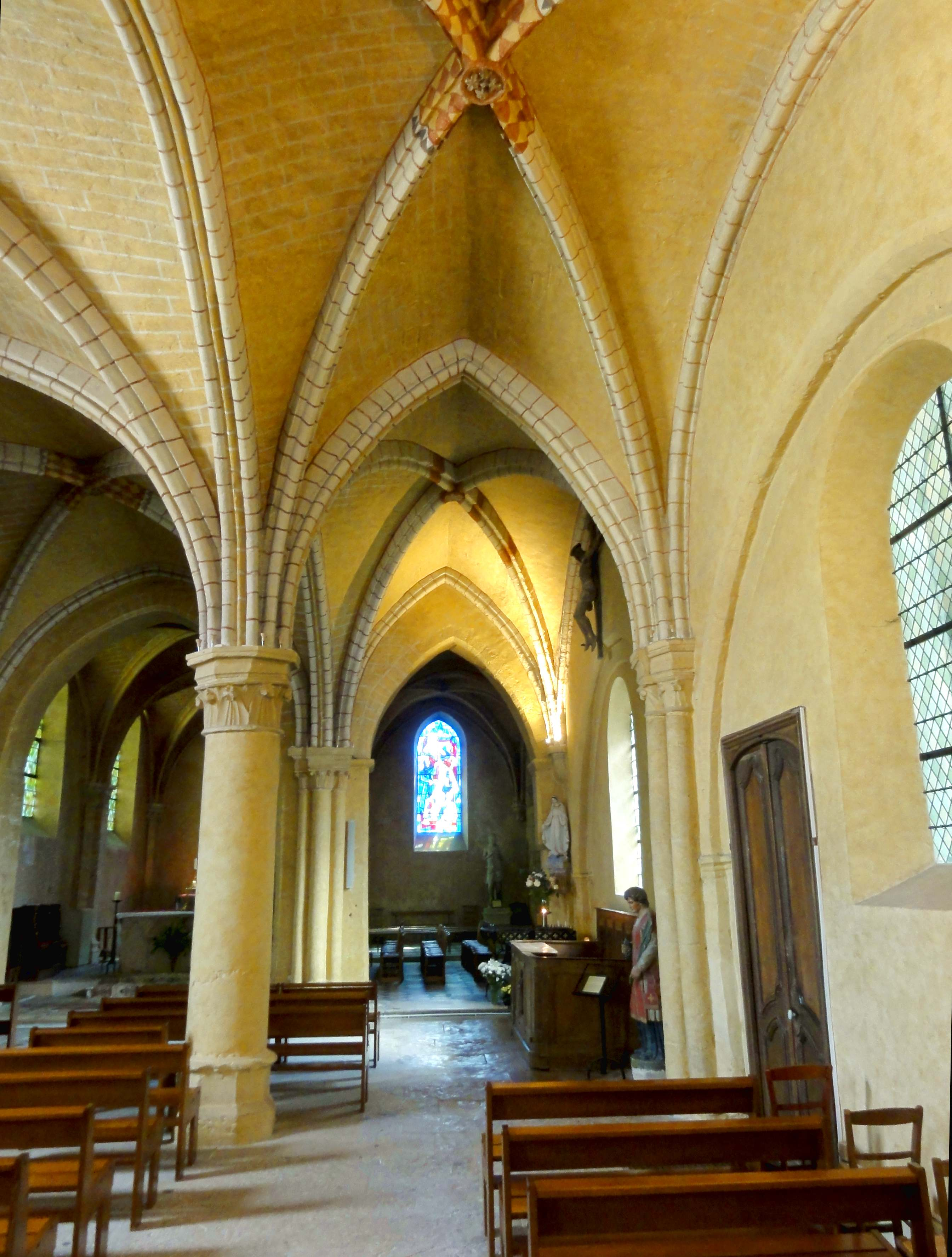 Intérieur de l'église - voir titre.